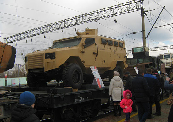 Сирийский перелом в Биробиджане